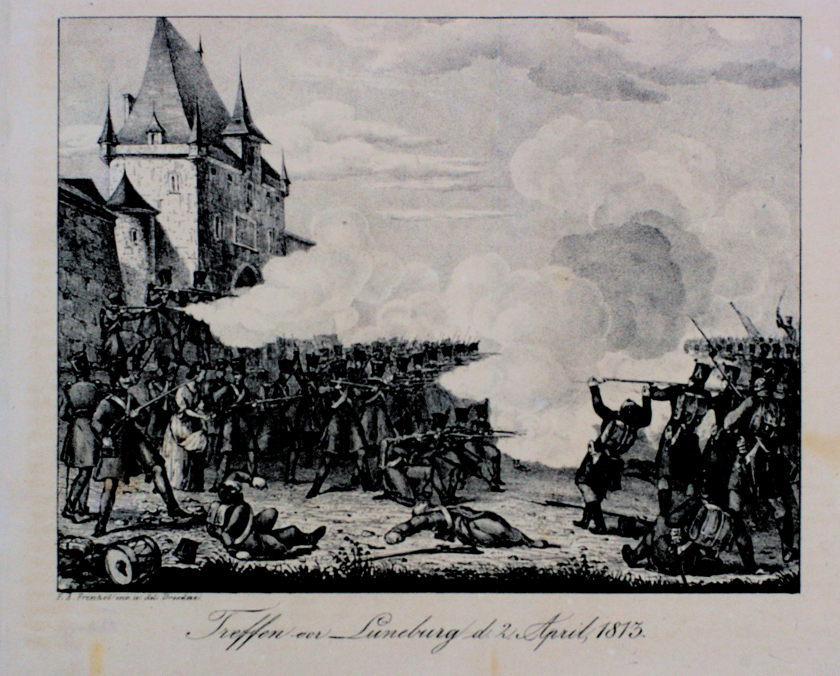 Die Bilder enstanden anläßlich eines Workshops im Rahmen von Skillshare 2010 in Zusammenarbeit mit dem Stadtarchiv Lüneburg. Die Originale wurden freundlicherweise vom Stadtarchiv zur Verfügung gestellt. Truppen vor Lüneburg am 2. April 1813 (F. A. Frenzel 1782-1855, Kupferstecher) Registratur: K 10 Nr 57 (k)